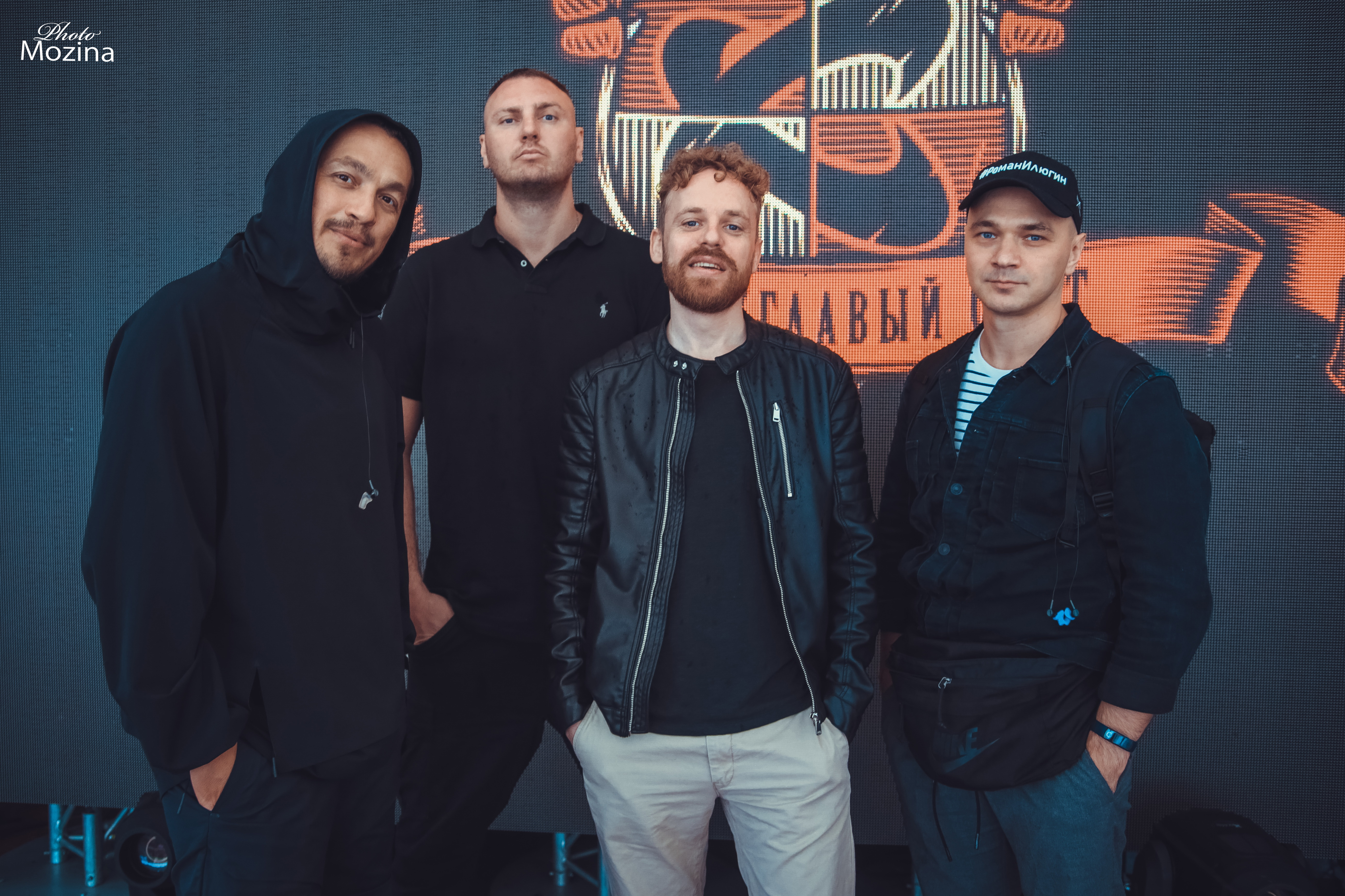 Группа «Каста». Концерт, 2019. Фото — Катя Мозина.